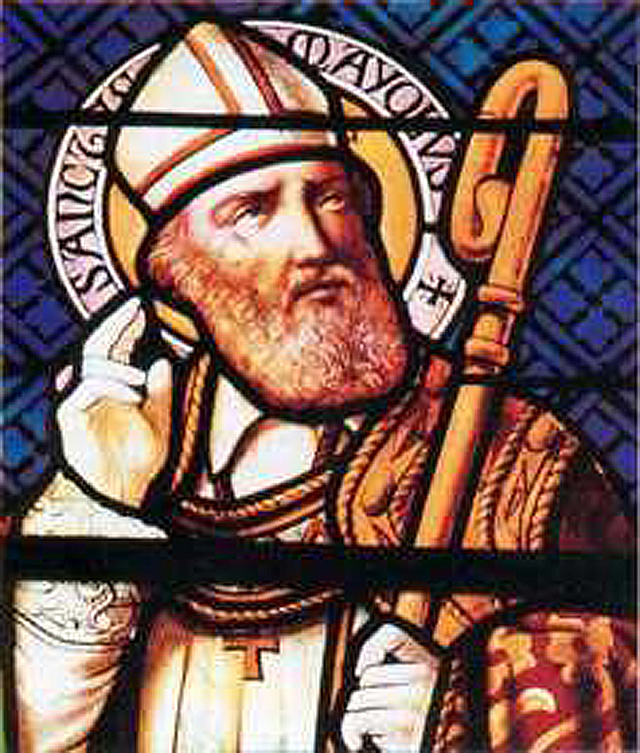 Mayeul, vitrail de Souvigny, dans le prieuré où il est inhumé